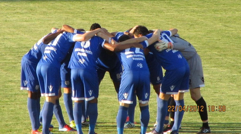 Отбора на Черноморец преди мач